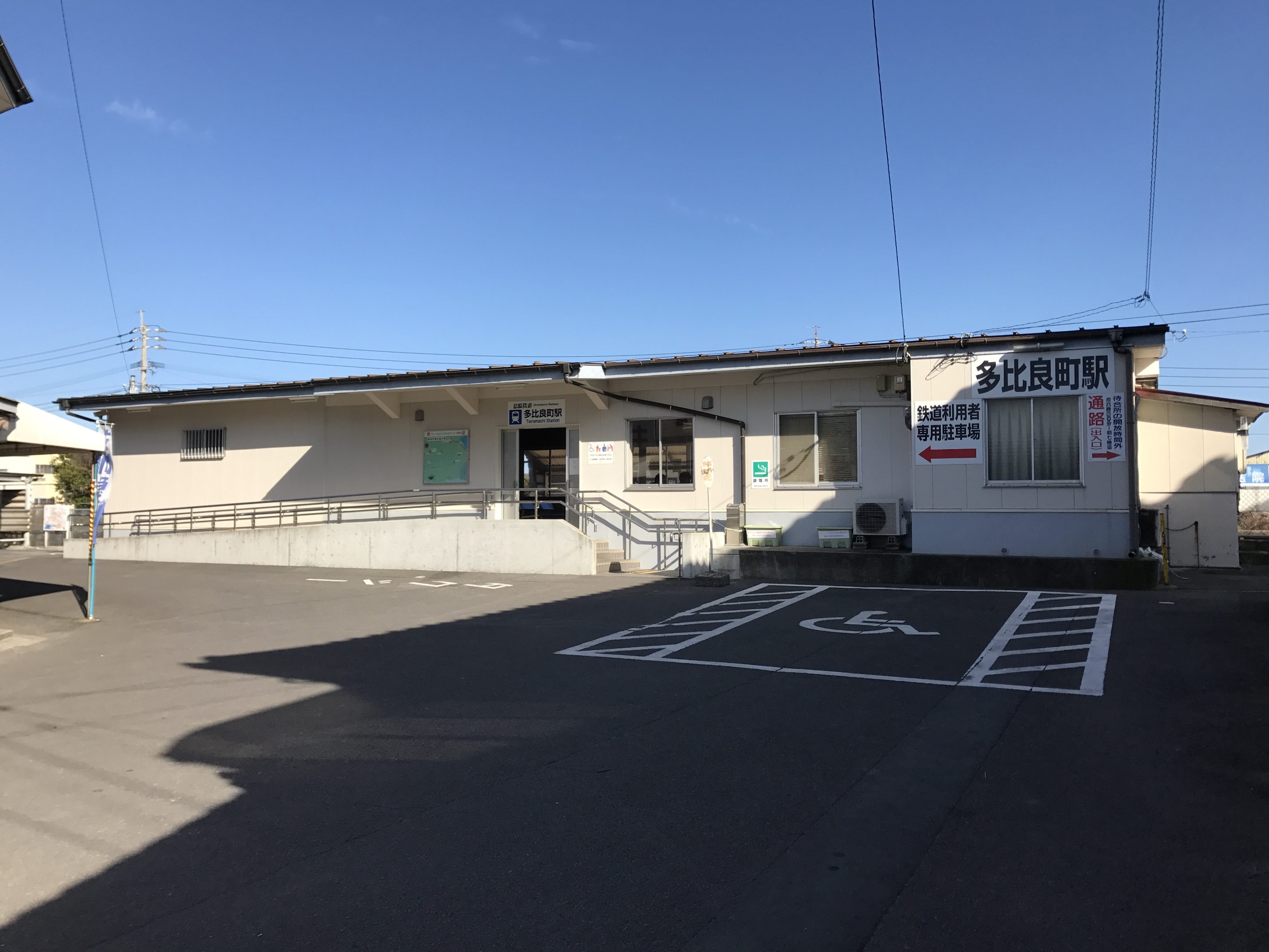 多比良町駅駅舎